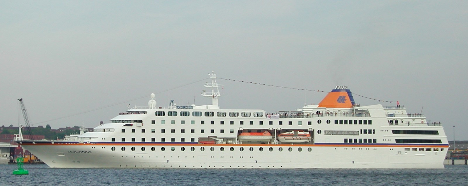 Kreuzfahrtschiff c. Columbus in der Kieler Förde.